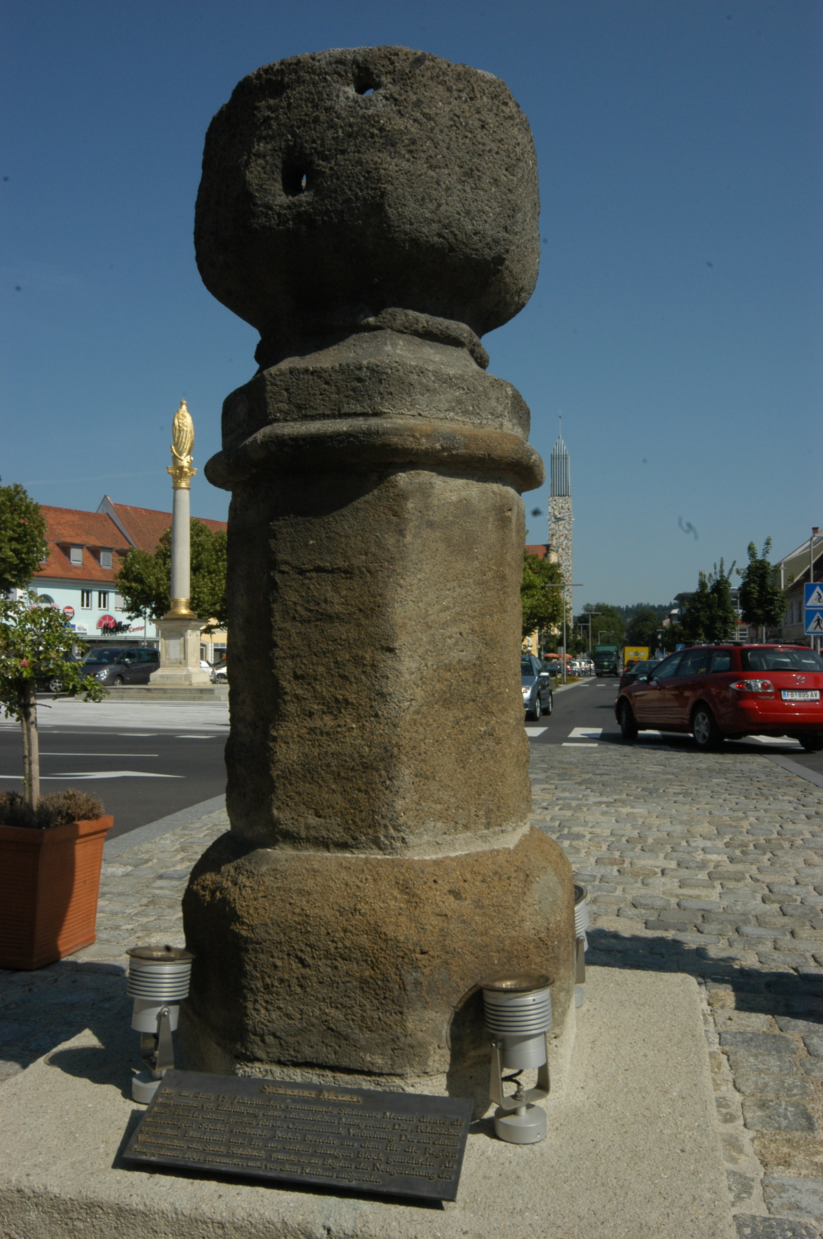 Der Feldbacher Metzen auf dem Hauptplatz von Feldbach in der Steiermark